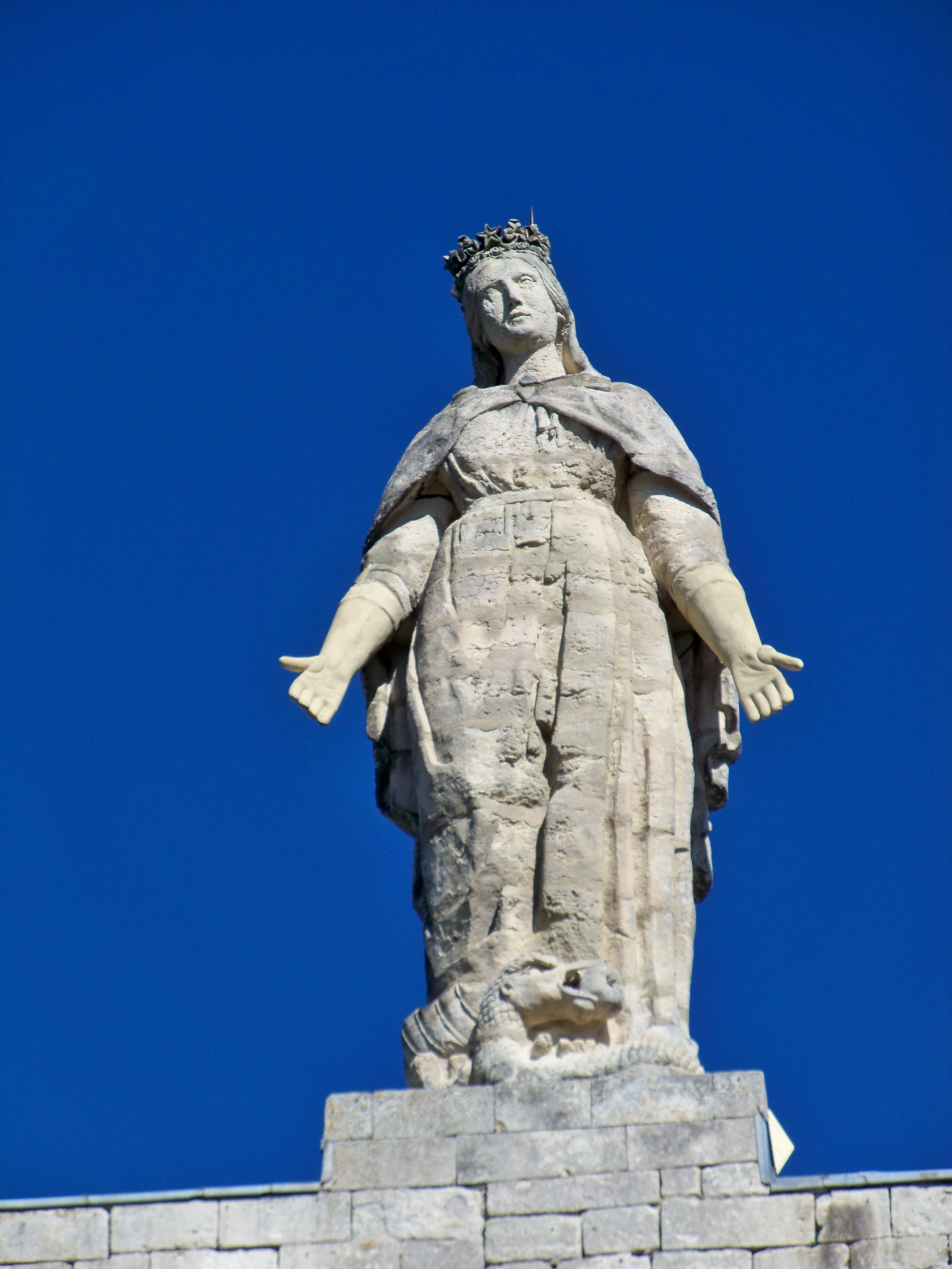 Tour-donjon de Clansayes, (Classement, 2006) .